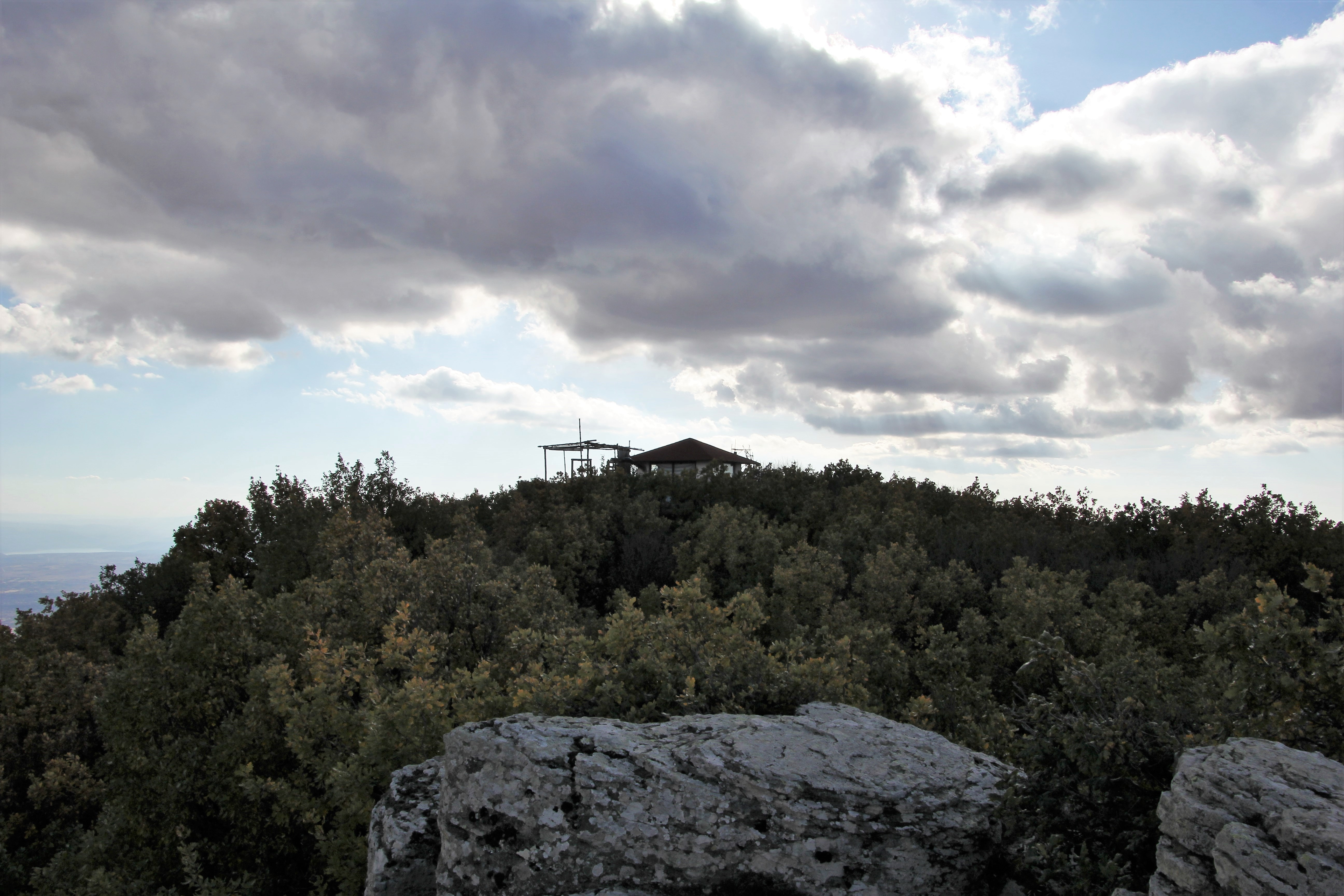 Bolotana, vedetta A.I. di punta Palai